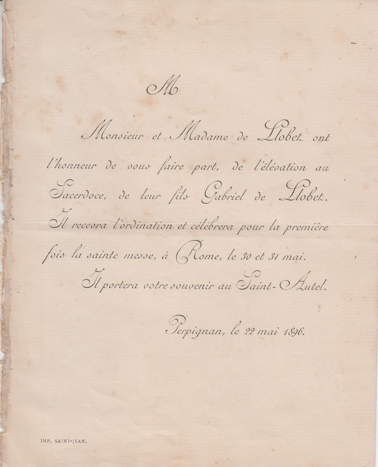 Faire-part d'ordination de Gabriel de Llobet (1872-1957), futur évêque de Gap et archevêque d'Avignon.